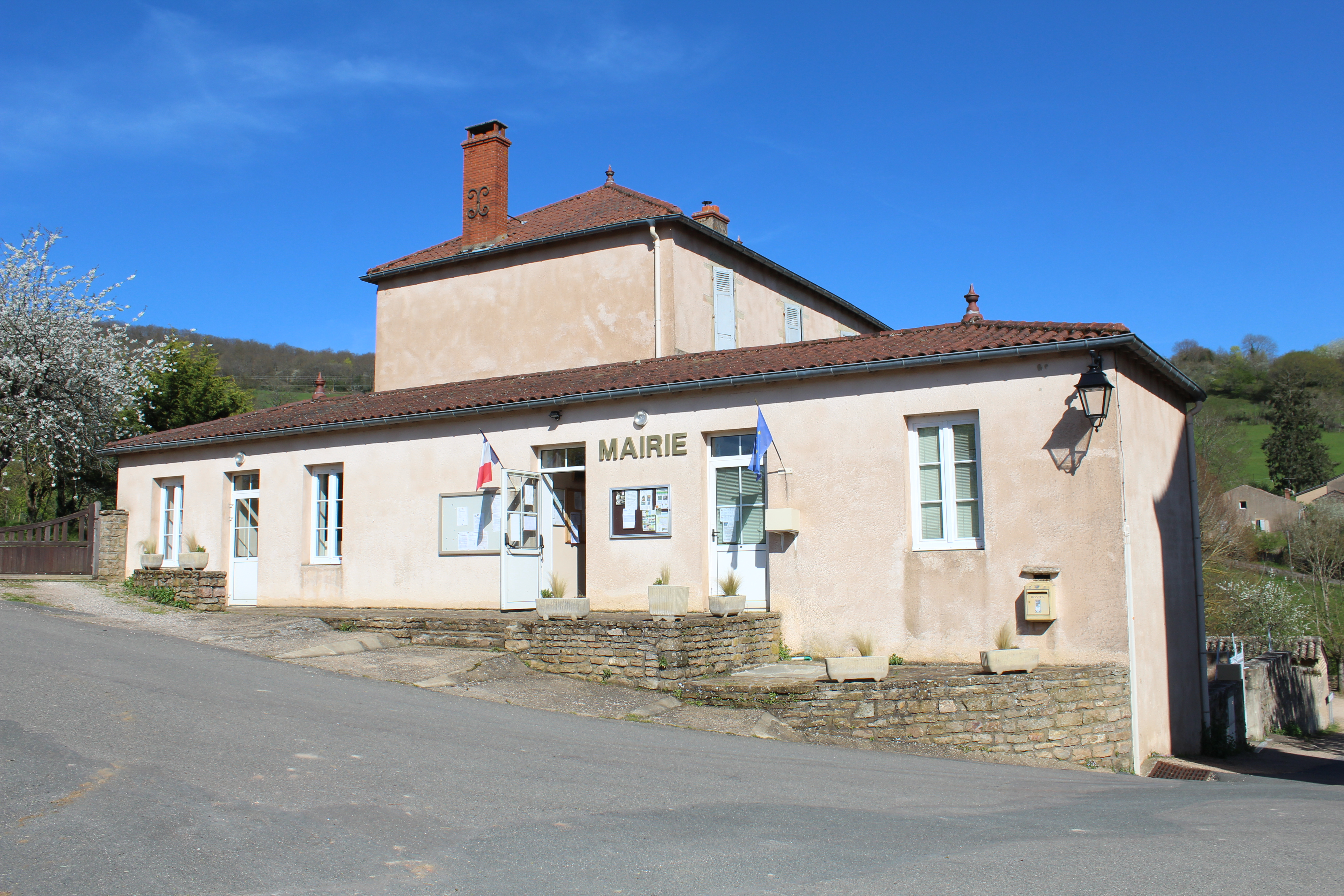 Mairie de Berzé-le-Châtel.